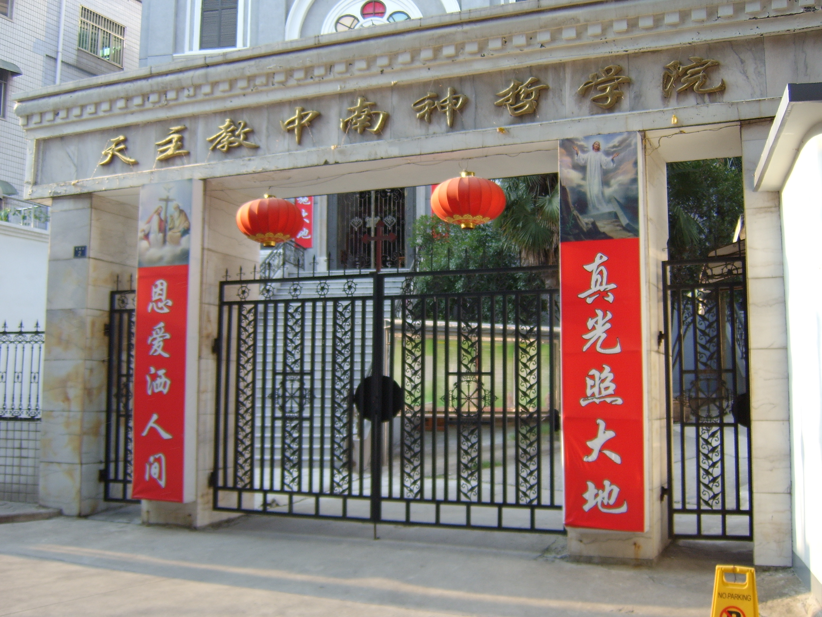 中文（中国大陆）: 天主教中南神哲学院正门景观